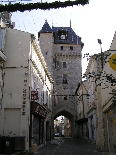 tour de l'horloge de Saint-Jean-d'Angély